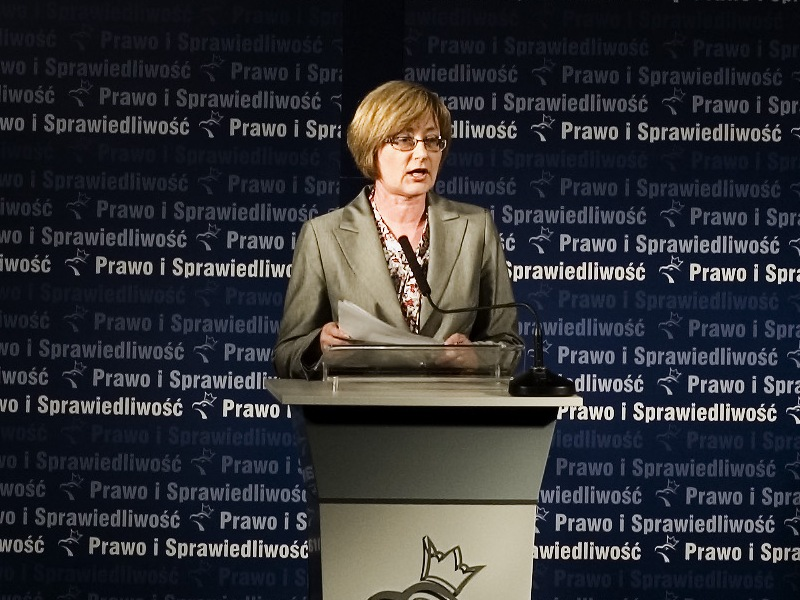 Aleksandra Natalli-Świat - posłanka PiS - na spotkaniu programowym partii w Kole